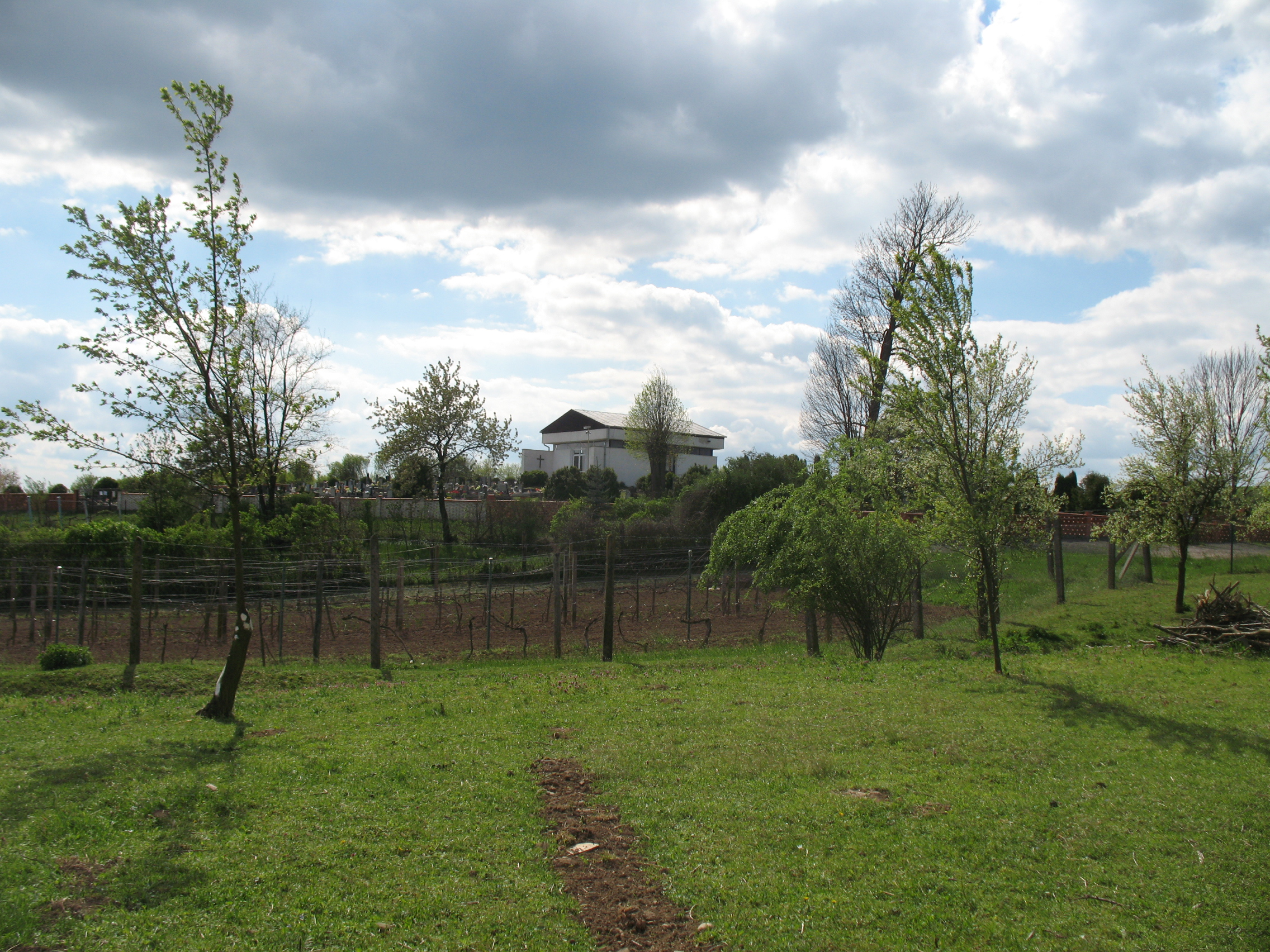 Terény